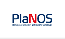 Logo Planungsgesellschaft Nahverkehr Osnabrück GbR